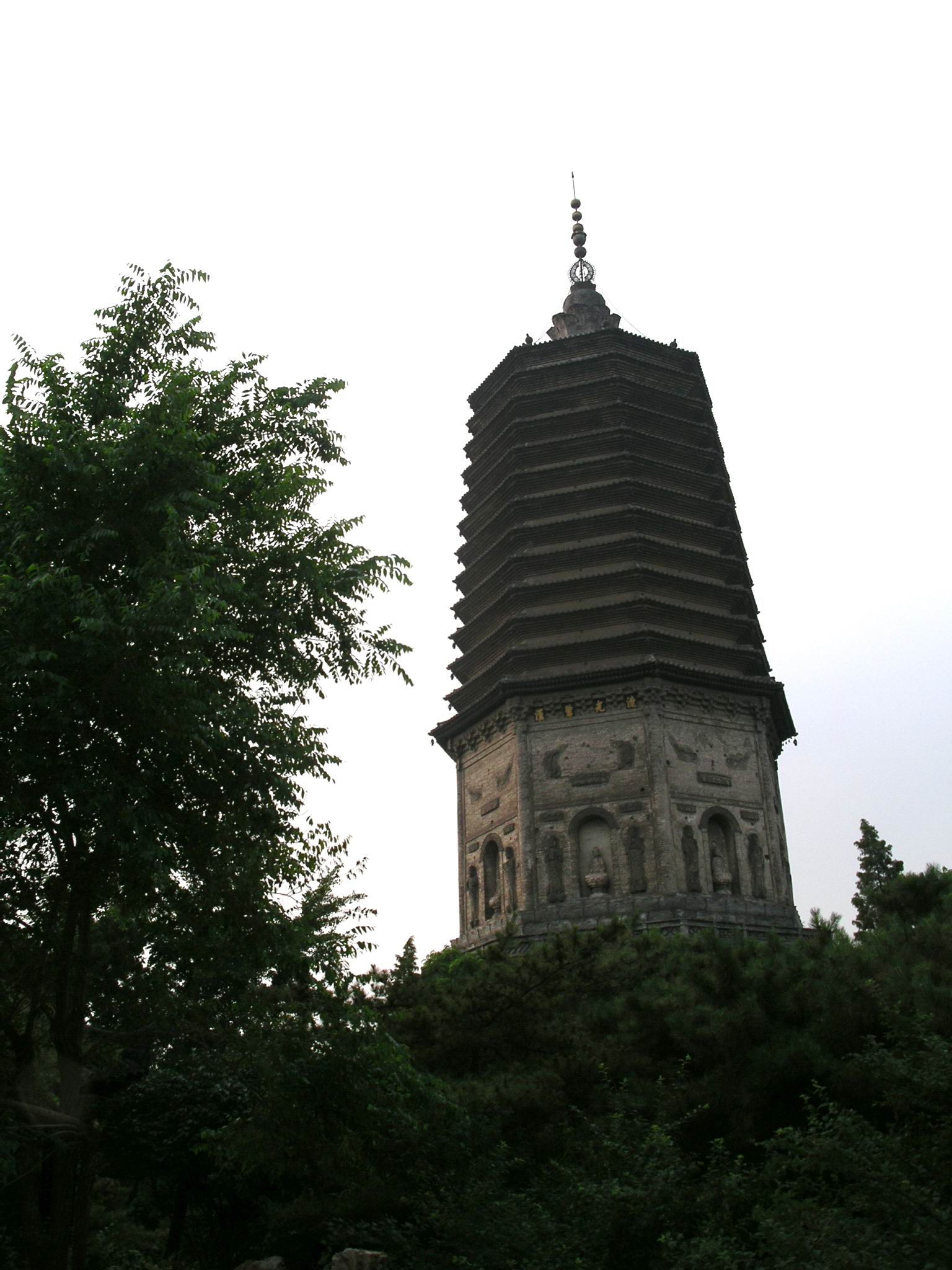 Beschreibung: Der 70 m hohe Turm auf dem Bild heisst Bai Ta und ist das Grabmal der Mutter des Koenigs Wan Yan Yong. Dieser Koenig lebte und herrschte zu einer Zeit, als es das große vereinigte China zwar schon gab, aber die Mandschurei noch nicht zum großen China der vereinigten sieben Länder gehörte. Damals, im Jahr 1161 bis 1189 nach Christus, als der Bai Ta, der weiße Turm erbaut wurde, war Liaoyang noch die Hauptstadt eines Landes namens Jin Guo. Aber diese Zeit war schon die Endzeit von Jin Guo, denn Dschingis Khan, der große Eroberer aus der Mongolei eroberte kurz danach zuerst Jin Guo und dann unglaublicher Weise tatsächlich auch das große China (Zhong Guo), welches damals wie gesagt aus einem – kriegerisch erzwungenen – Zusammenschluss von sieben Ländern bestand. Dschingis Khan beendete mit dieser Eroberung damals die Song Dynastie, unter welcher die chinesische Bevölkerung viel zu leiden hatte und stark verarmte. In China begann damit dann die Yuan Dynastie.